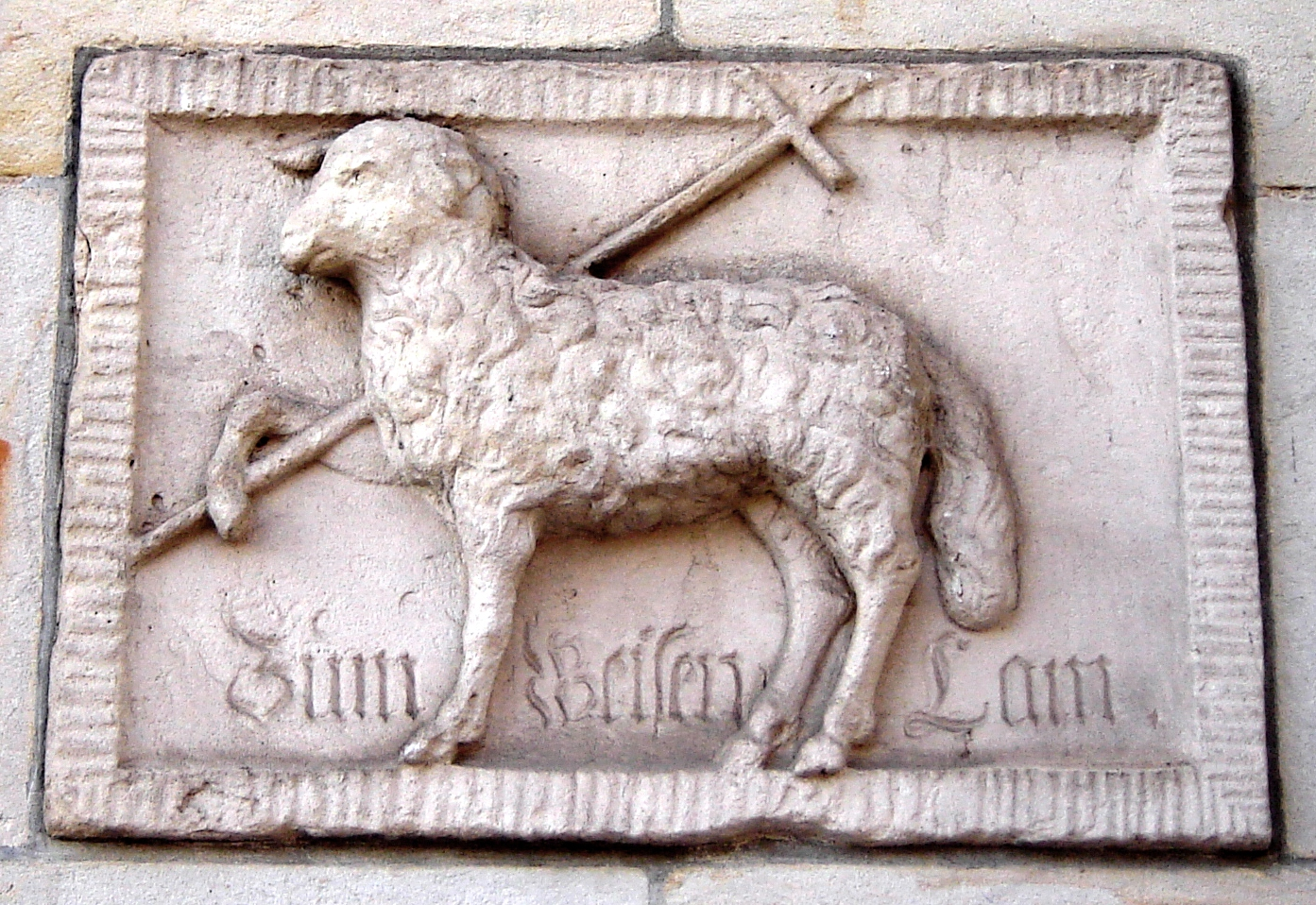 Magdeburg, Hauszeíchen Alter Markt 1